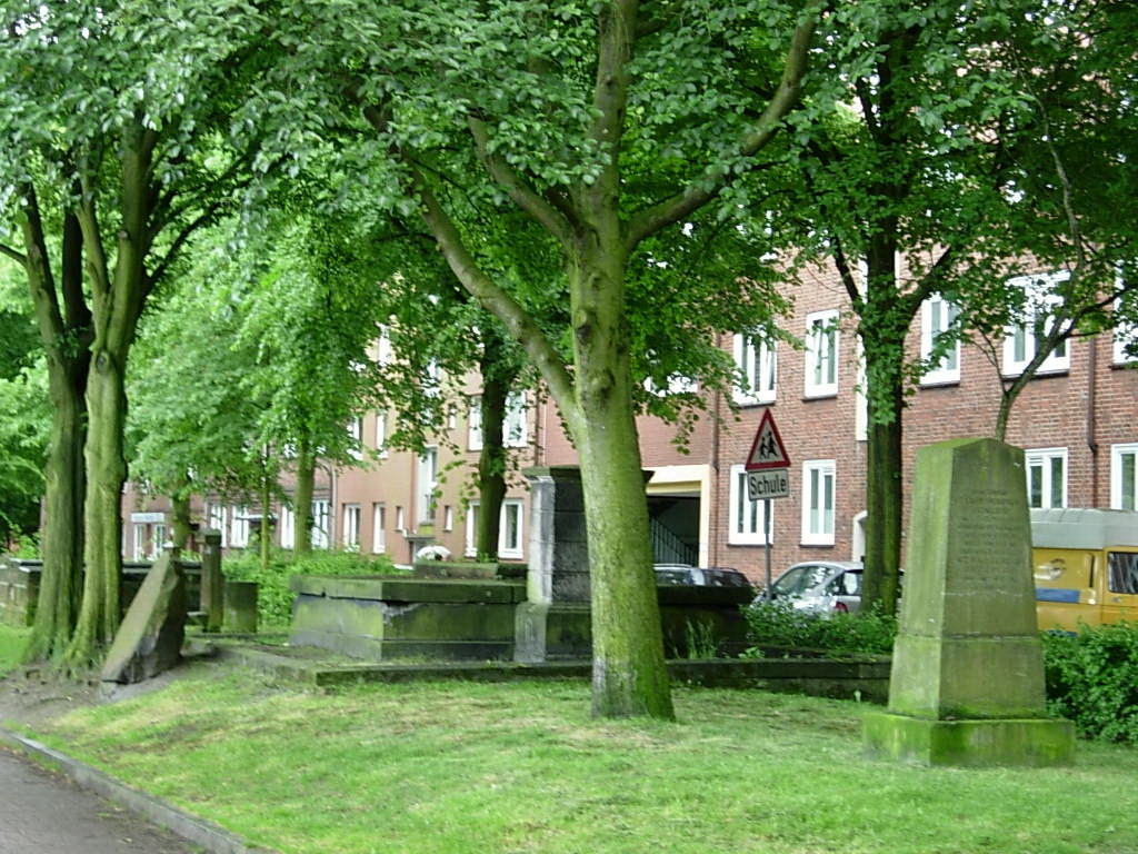 Historische Grabsteine von Heinrich Christian Schumacher (rechts) und Conrad Hinrich Donner (links) des ehemaligen Heilig-Geist-Kirchhofes (Behn-/Ecke Struenseestraße) in Altona-Altstadt.